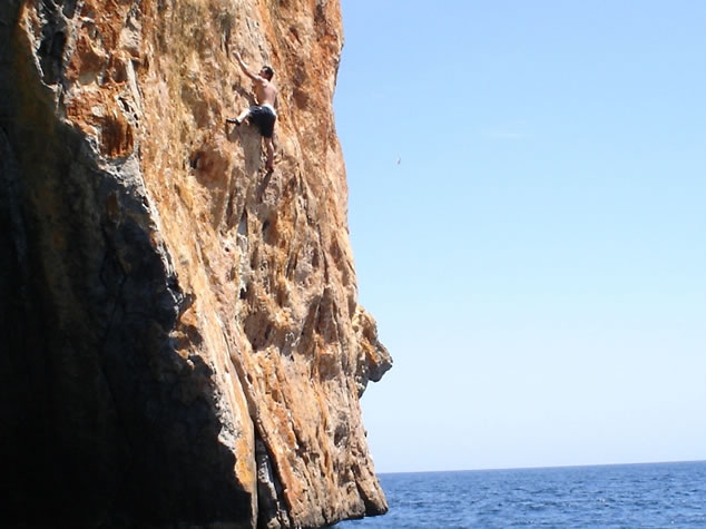 La practica del psicobloc.